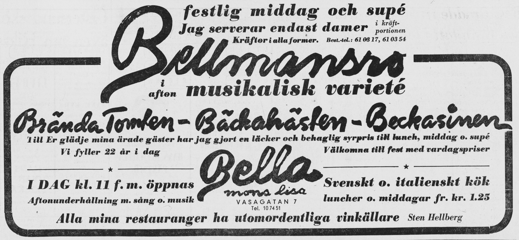 Annons i Dagens Nyheter för restaurangerna Brända tomten, Bäckahästen, Beckasinen och Bellamansro